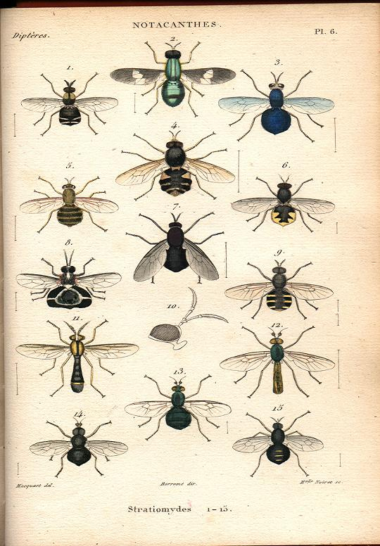 Plate from Justin Pierre Marie Macquart's. Histoire naturelle des insectes. Dipteres Paris : Roret. 1834-1835